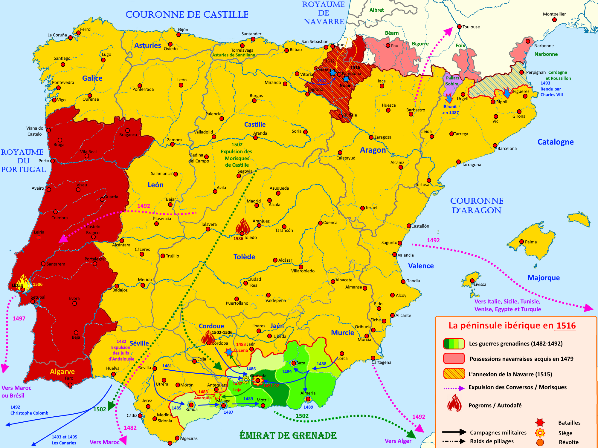 Carte de la péninsule ibérique en 1516 avec ses principaux évènements